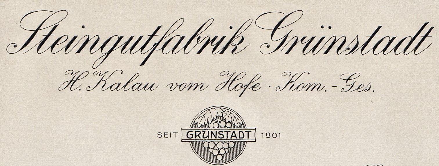 Steingutfabrik Grünstadt Firmenkopf (eigener Scan von eigenem Brief)